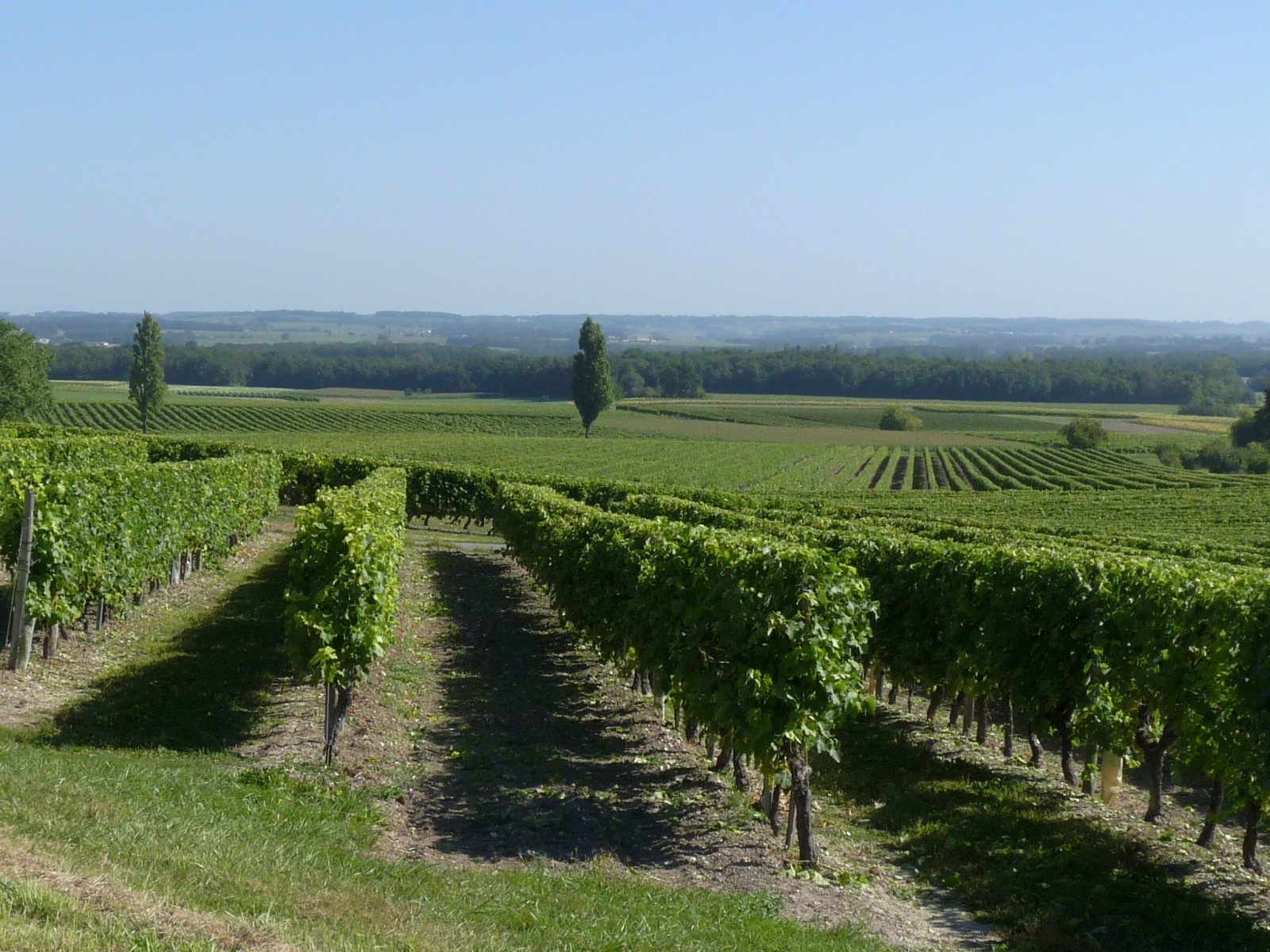 Le vignoble près du bourg de St-Eugène, Charente-Maritime, France